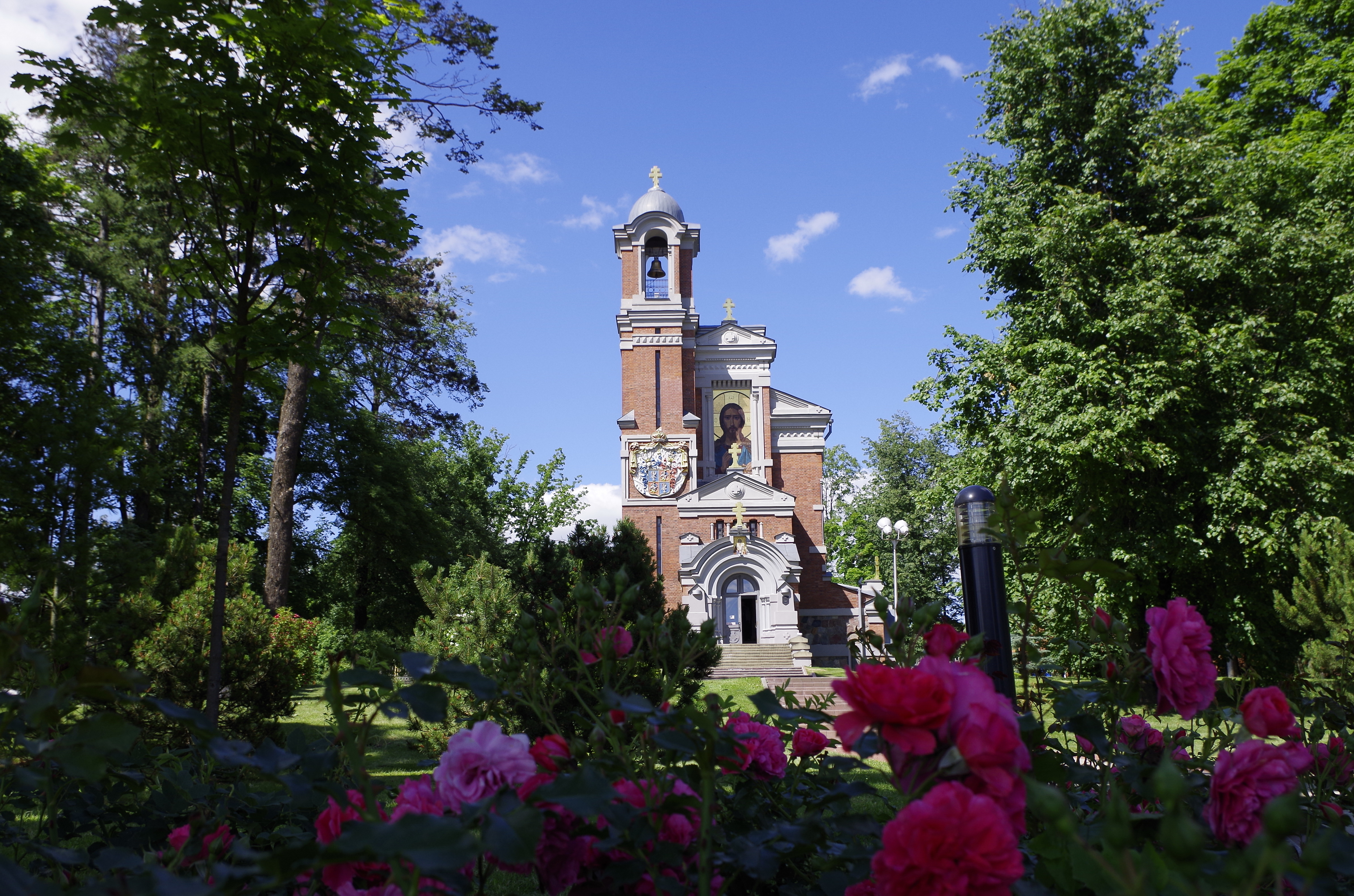 Mir, Belarus